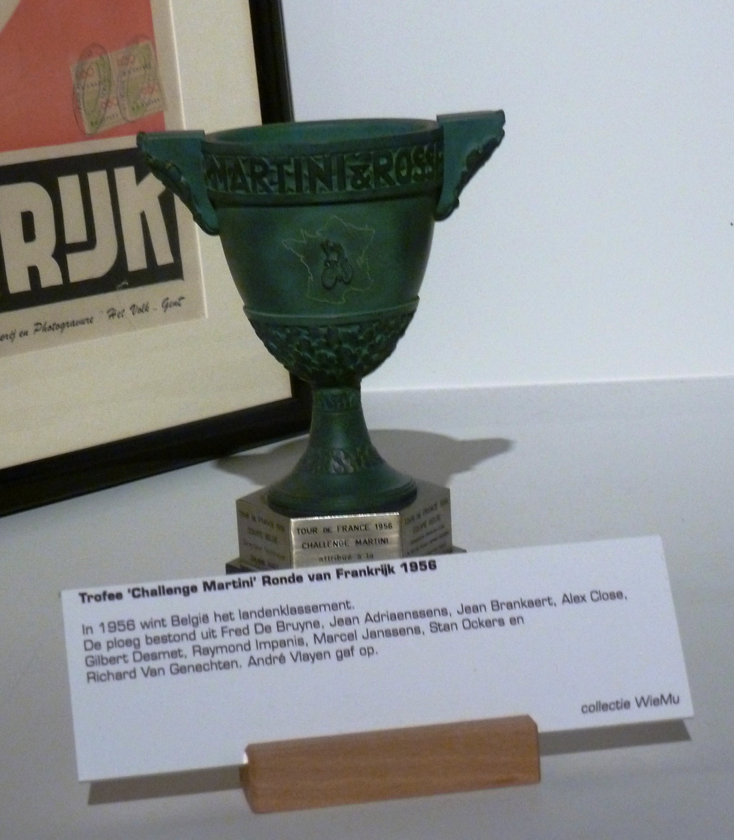 Trofée Challenge Martini für den Gewinn der Nationenwertung, Tour de France 1956, für Belgien, im National Wielermuseum in Roeselaere, Belgien